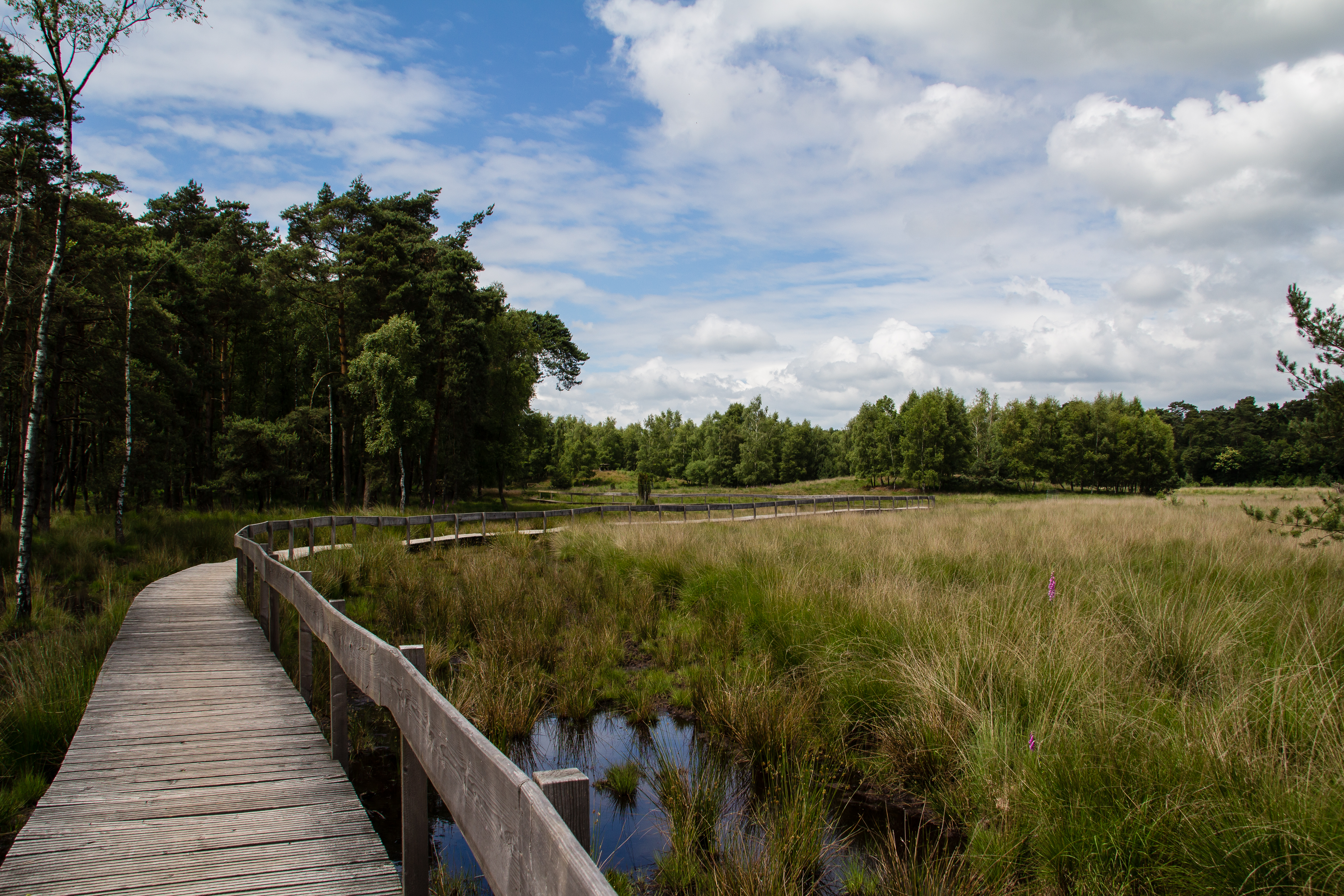 Auf dem befestigtem Rundweg im Diersfordter Wildgatter, Bereich in Hamminkeln, Naturschutzgebiet „Diersfordter Wald“ (NSG WES-007) und FFH-Gebiet DE-4205-301 „Großes Veen“